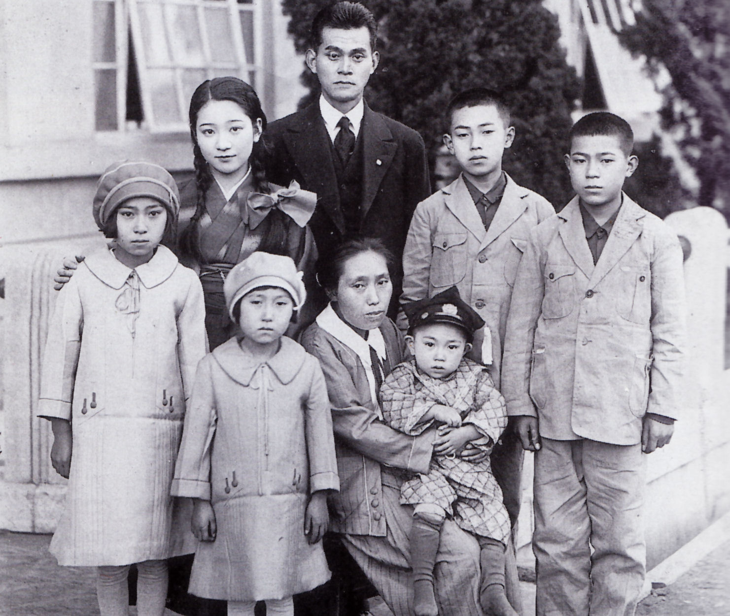 園井恵子と叔父・袴田多助一家